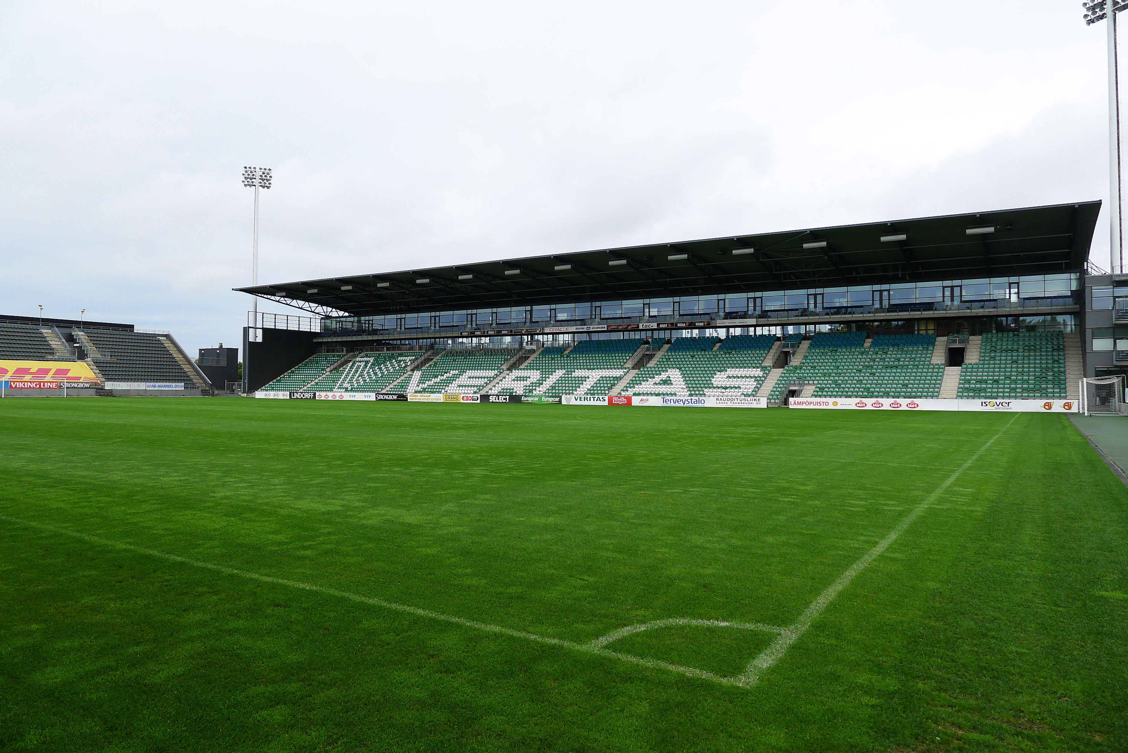 Veritas Stadion 23.7.2015